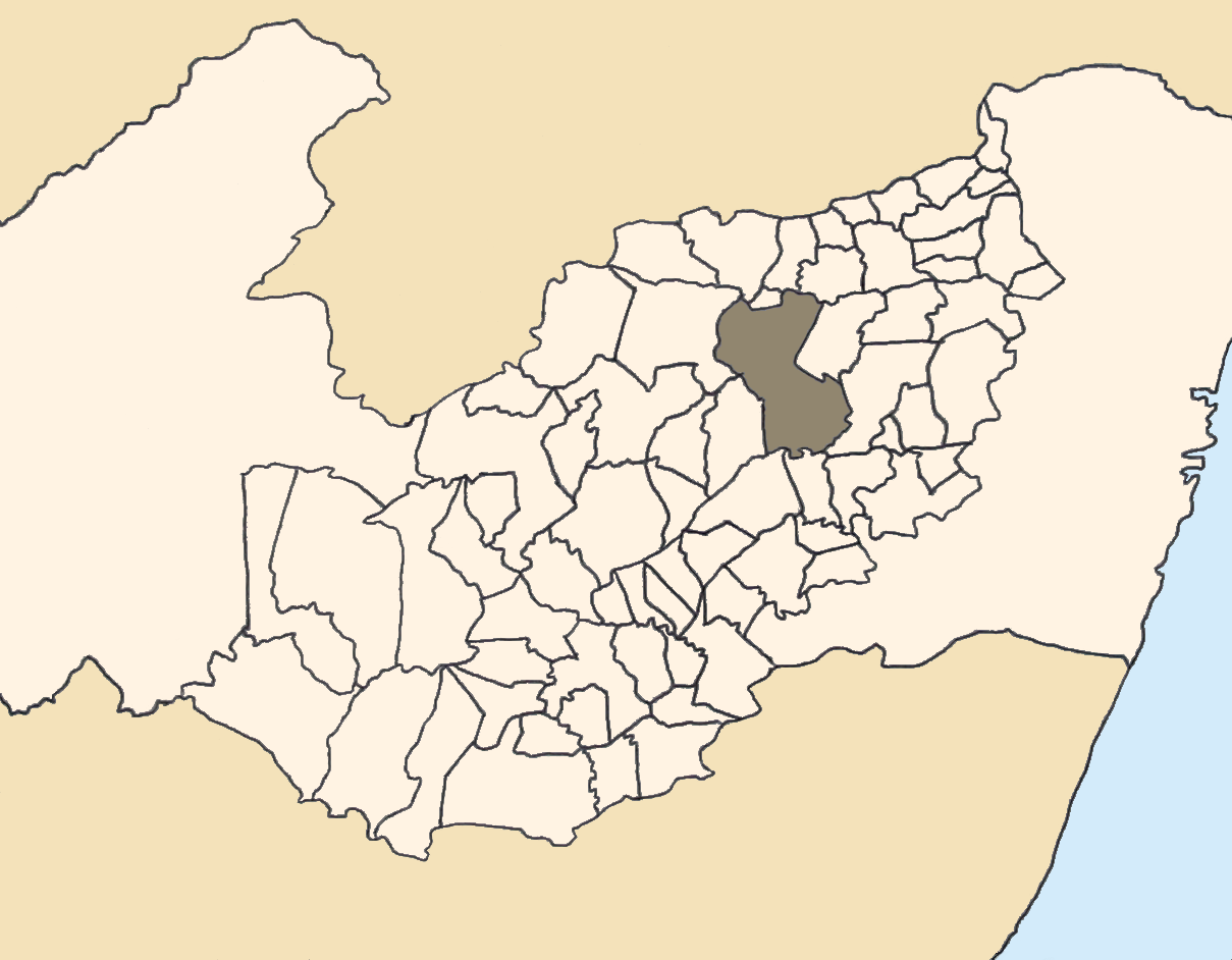 Mapa da mesorregião Agreste de Pernambuco (Brasil) subdivida em municípios. Em destaque, o município de Caruaru. Map of the brazilian state of Pernambuco (mesorregião Agreste) showing the city of Caruaru. Imagem tratada com o GIMP. Image made with GIMP.